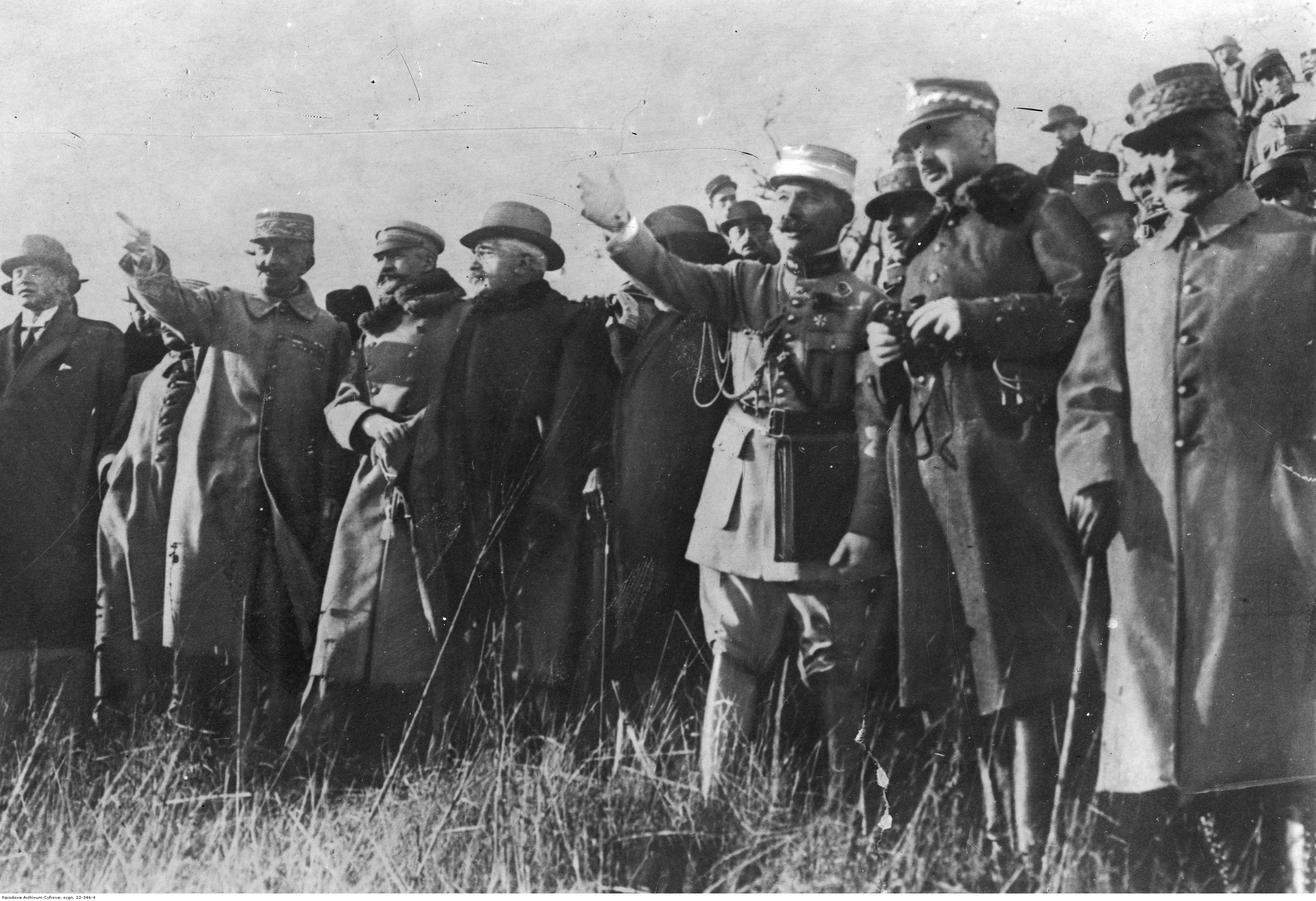 Naczelnik Państwa Józef Piłsudski zwiedza pole bitwy pod Verdun. Widoczni m.in. marszałek Philippe Petain (1. z prawej), gen. Kazimierz Sosnkowski (2. z prawej), prezydent Alexandre Millerand (na prawo od Piłsudskiego).